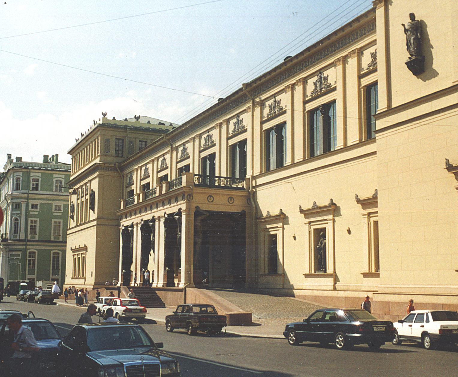 Вид здания Нового Эрмитажа со стороны Миллионной улицы